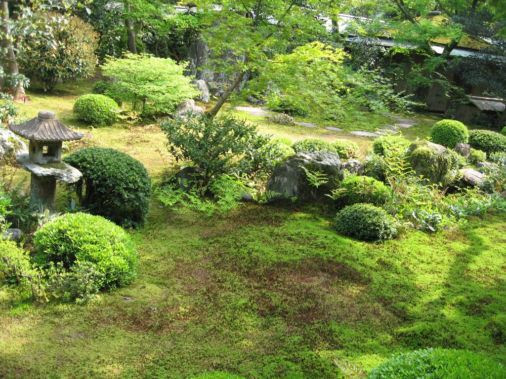 大徳寺塔頭 黄梅院の枯山水庭園です。